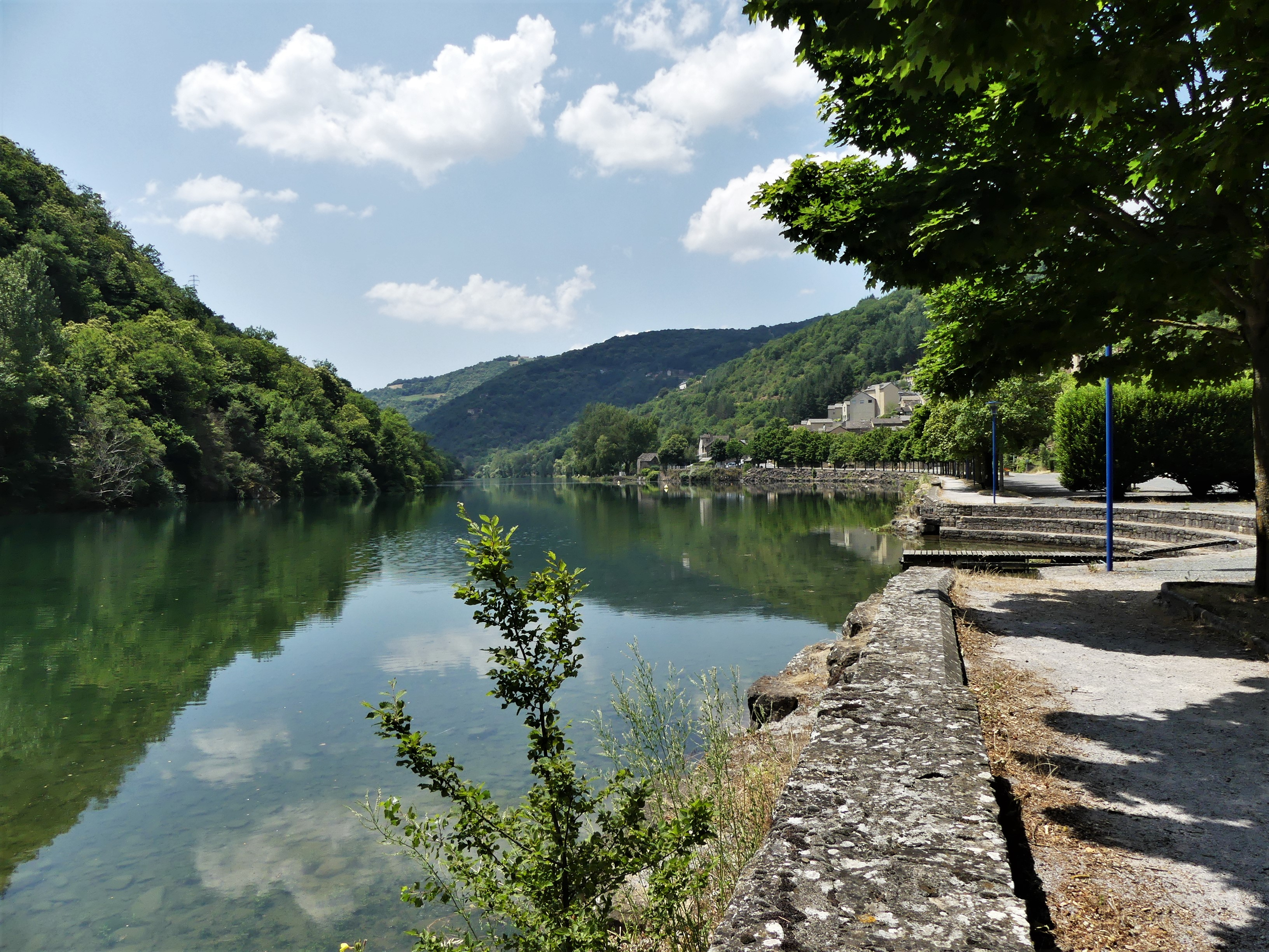 La retenue du barrage de la Jourdanie, Le Truel,Aveyron, France. Vue prise en direction de l'aval.